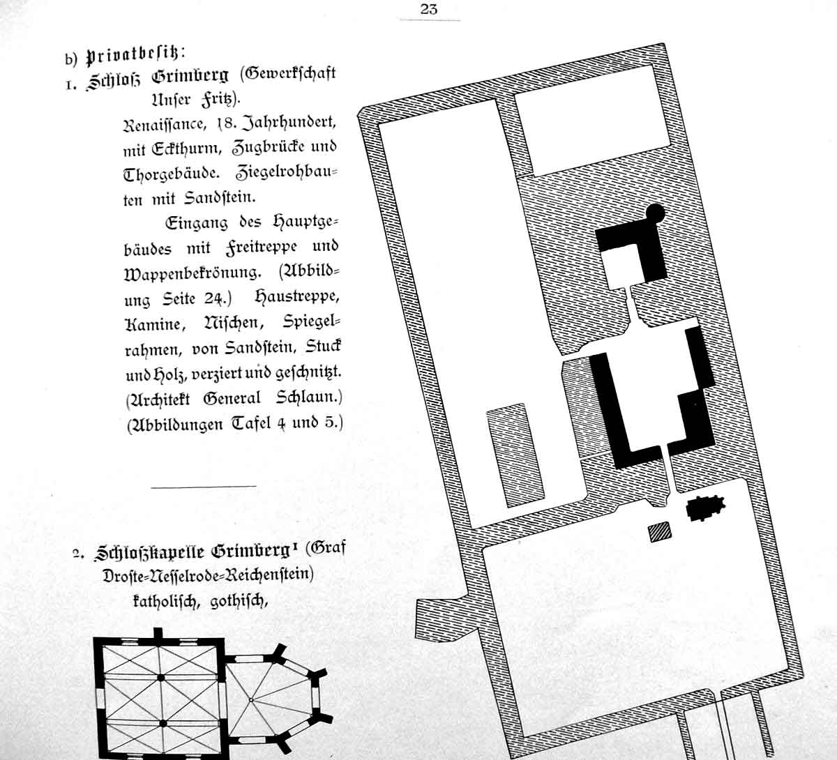 Lageplan des Schlosses Grimberg